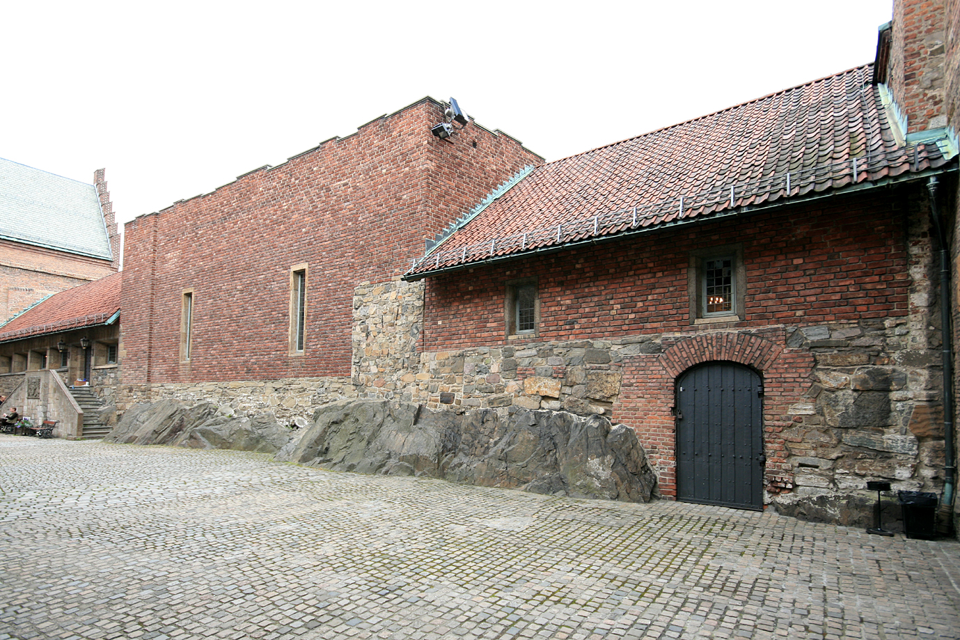 Borggården, Akershus slott, Oslo. Til høyre Fruerstuen. I midten restene av tårnet Vågehalsen, bygd ca. 1300. Til venstre fadebursfløyen.